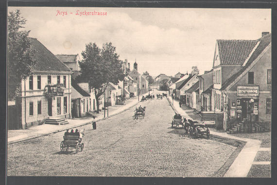 Arys